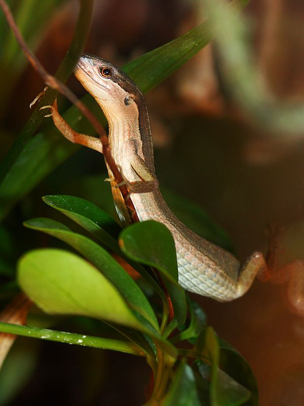 Takydromus sexlineatus female